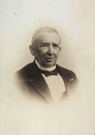 Louis Wilhelm Salomonsen